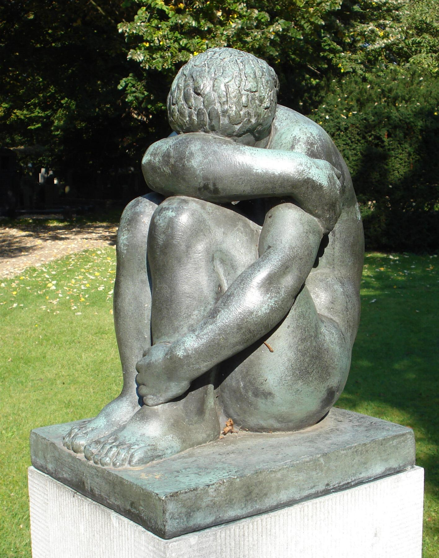 Vlaardingen, begraafplaats Emaus. Kunstwerk "Treurende vrouw" van Willy Kreitz. Vlaardingen/The Netherlands.